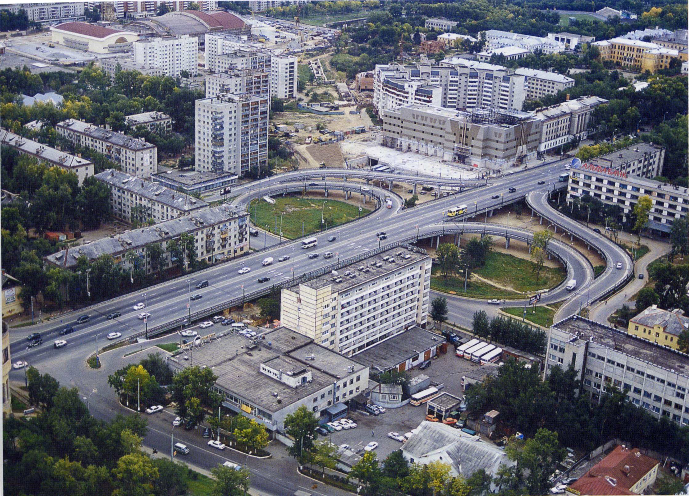 Khabarovsk